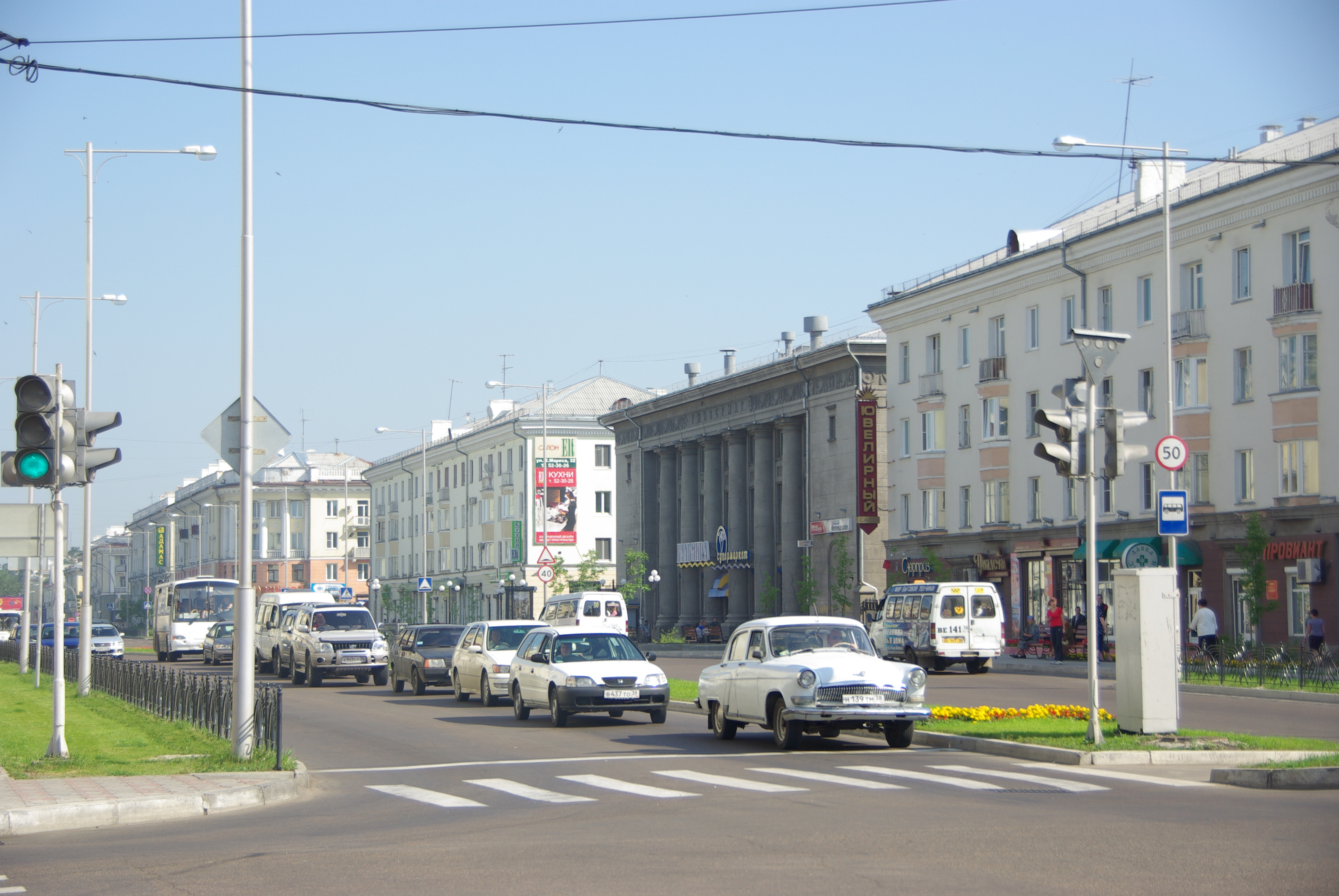 ГАЗ-21 в центре Ангарска